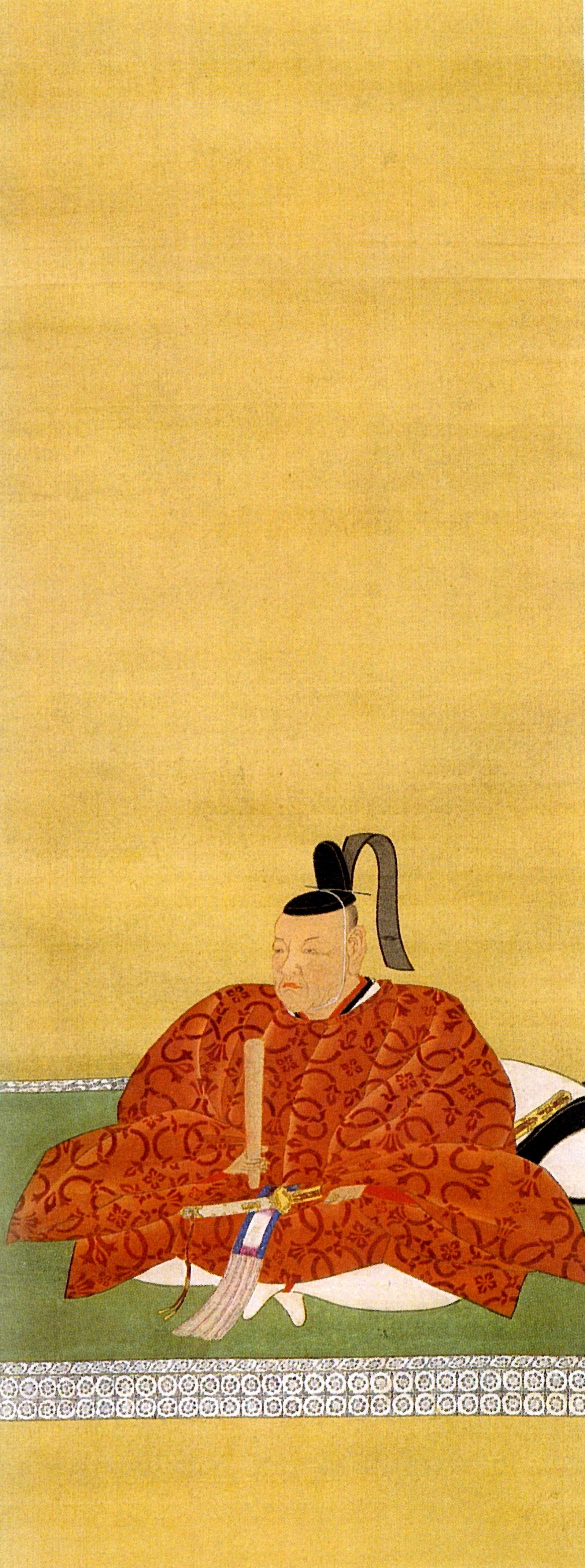 京極高中の肖像。